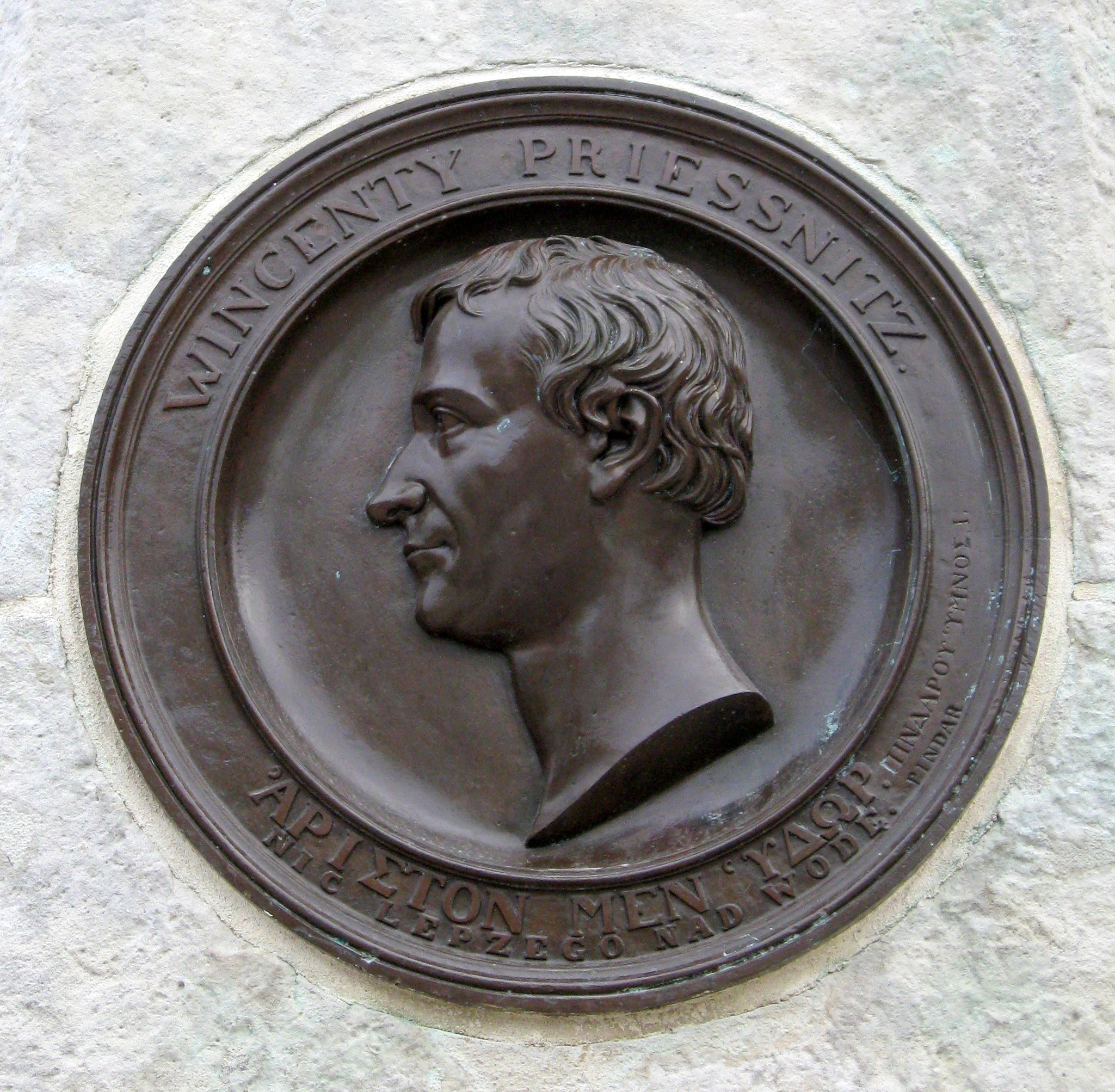 Wincenty Priessnitz, tablica pamiątkowa na pl. Wolności, Poznań, Polska